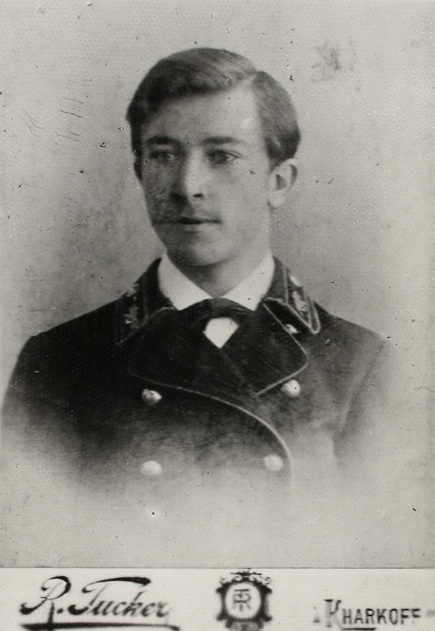 Олександр Олесь. Харків